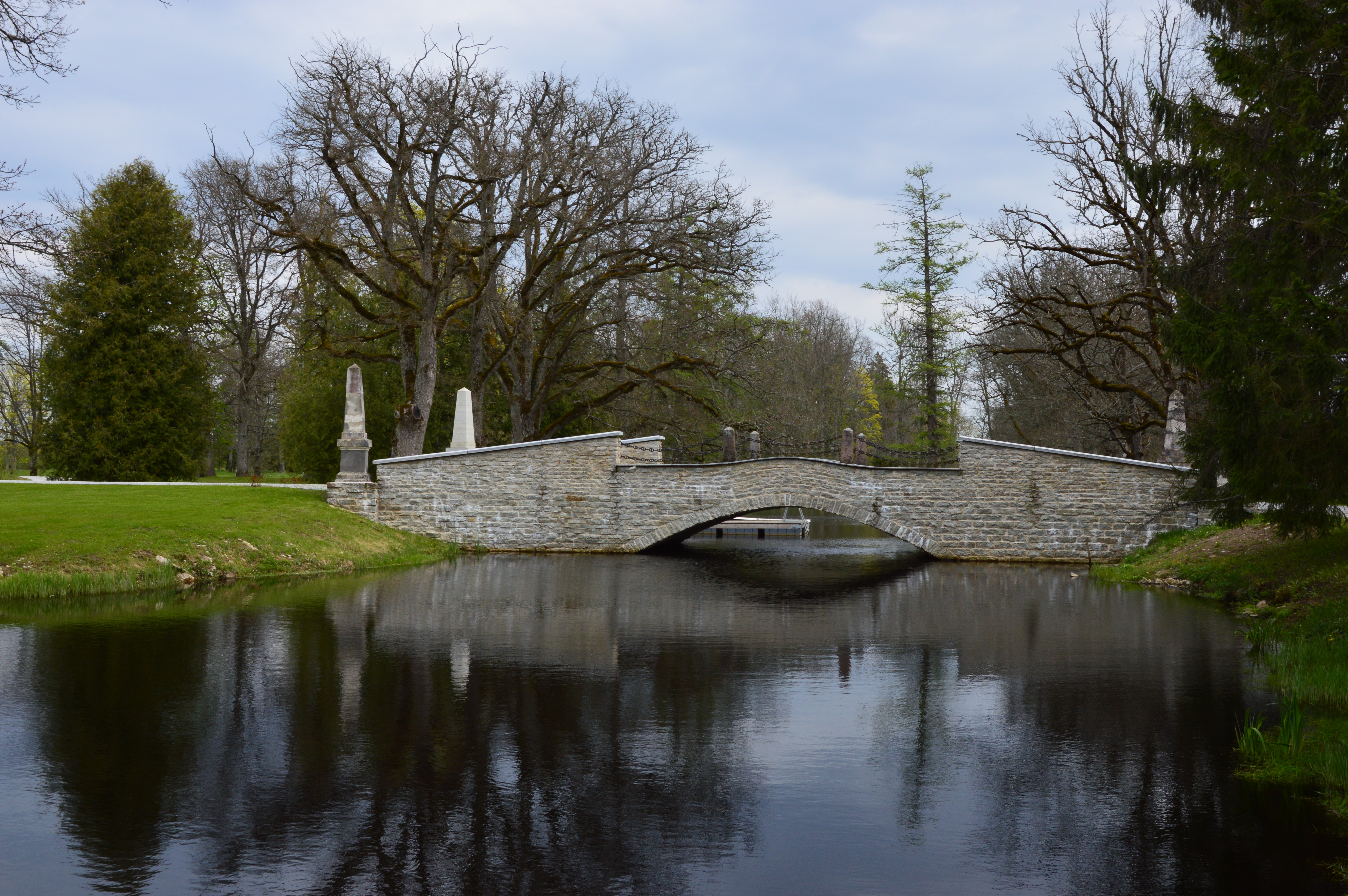 Koluvere mõisa peasild